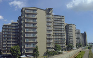 加古川グリーンシティの全景